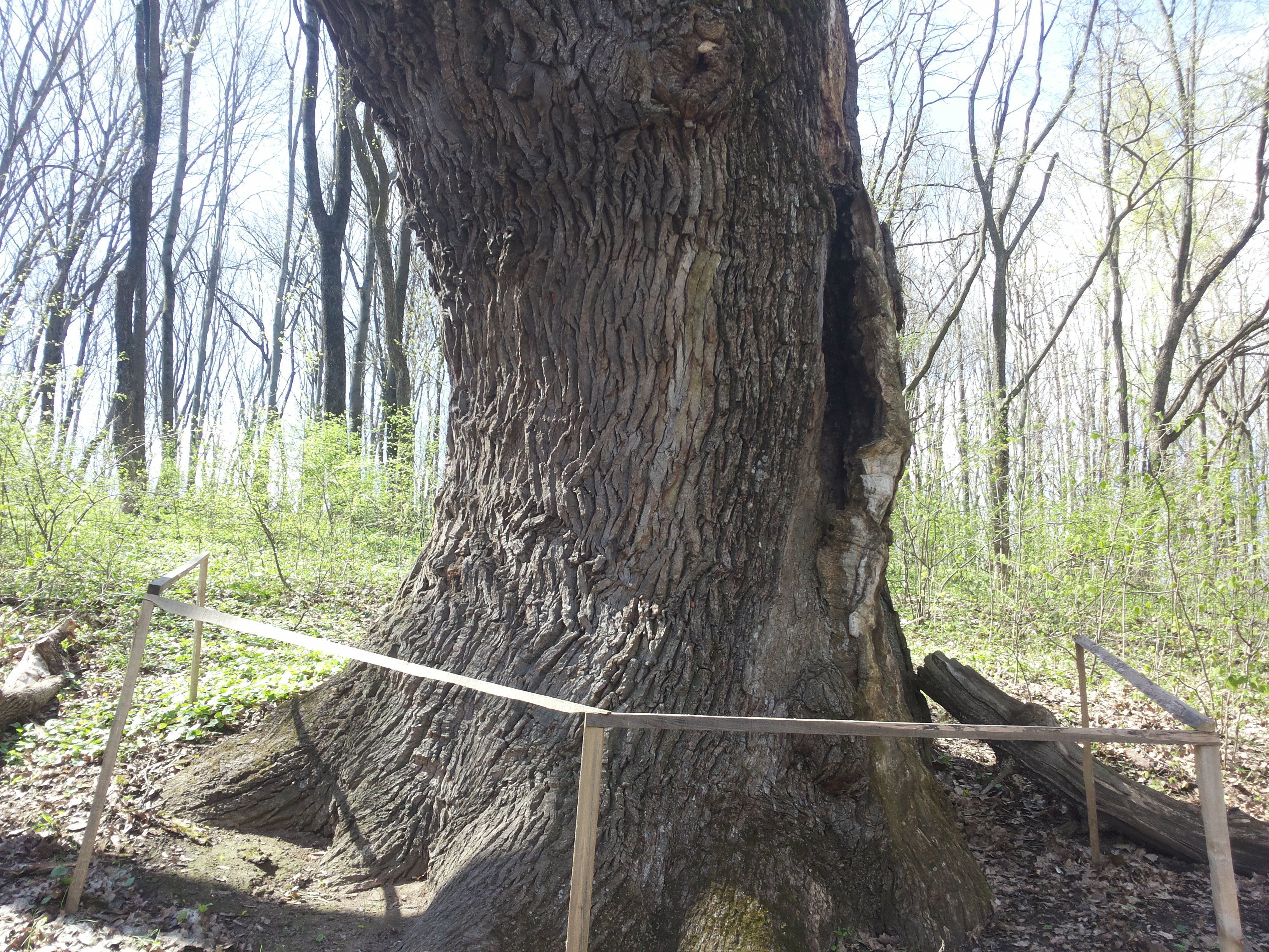 „Дуб-велетень № 3“, Валківський район Мерчицьке лісництво, кв. 73: вид. 1